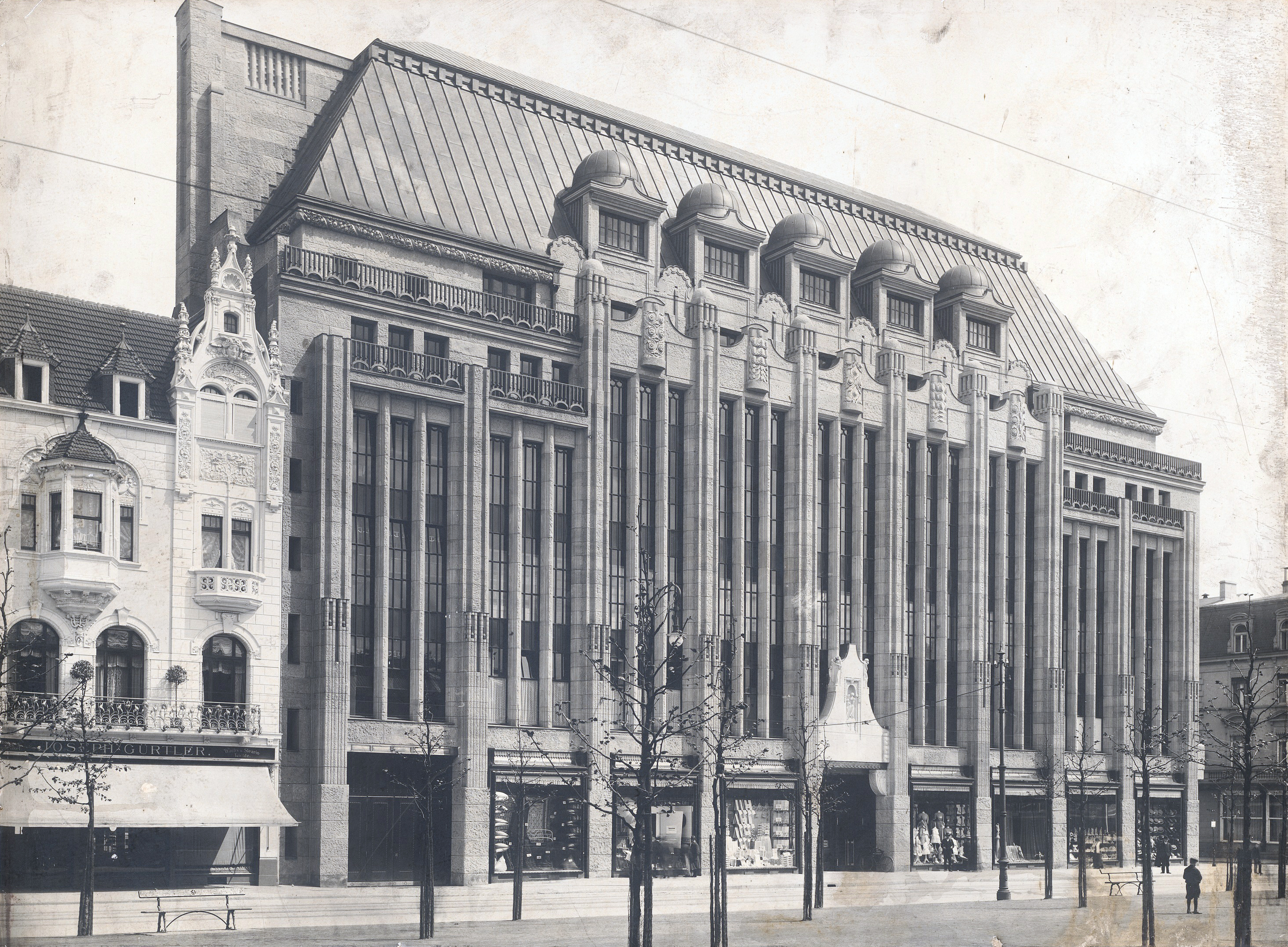 Olbrich Joseph Maria (1867-1908), Warenhaus Leonhard Tietz AG, Düsseldorf: Ansicht der Seitenfront vom Westen aus. Foto auf Karton, 64,9 x 87 cm (inkl. Scanrand). Architekturmuseum der Technischen Universität Berlin Inv. Nr. F 9221.